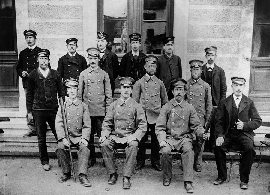 Das Horgner Stationspersonal der Nordostbahn (NOB)